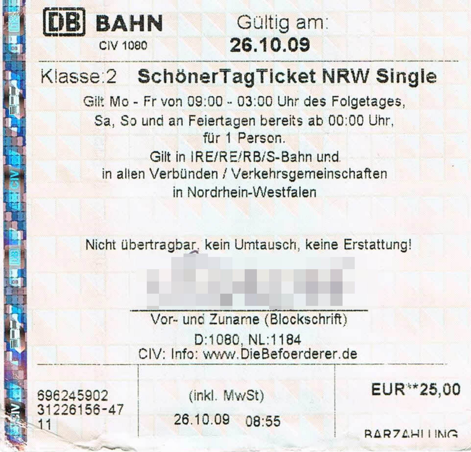 Deutsche Bahn - SchönerTagTicket NRW Single 2009